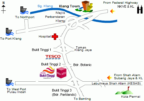 Peta lokasi Bandar Bukit Tinggi, Klang